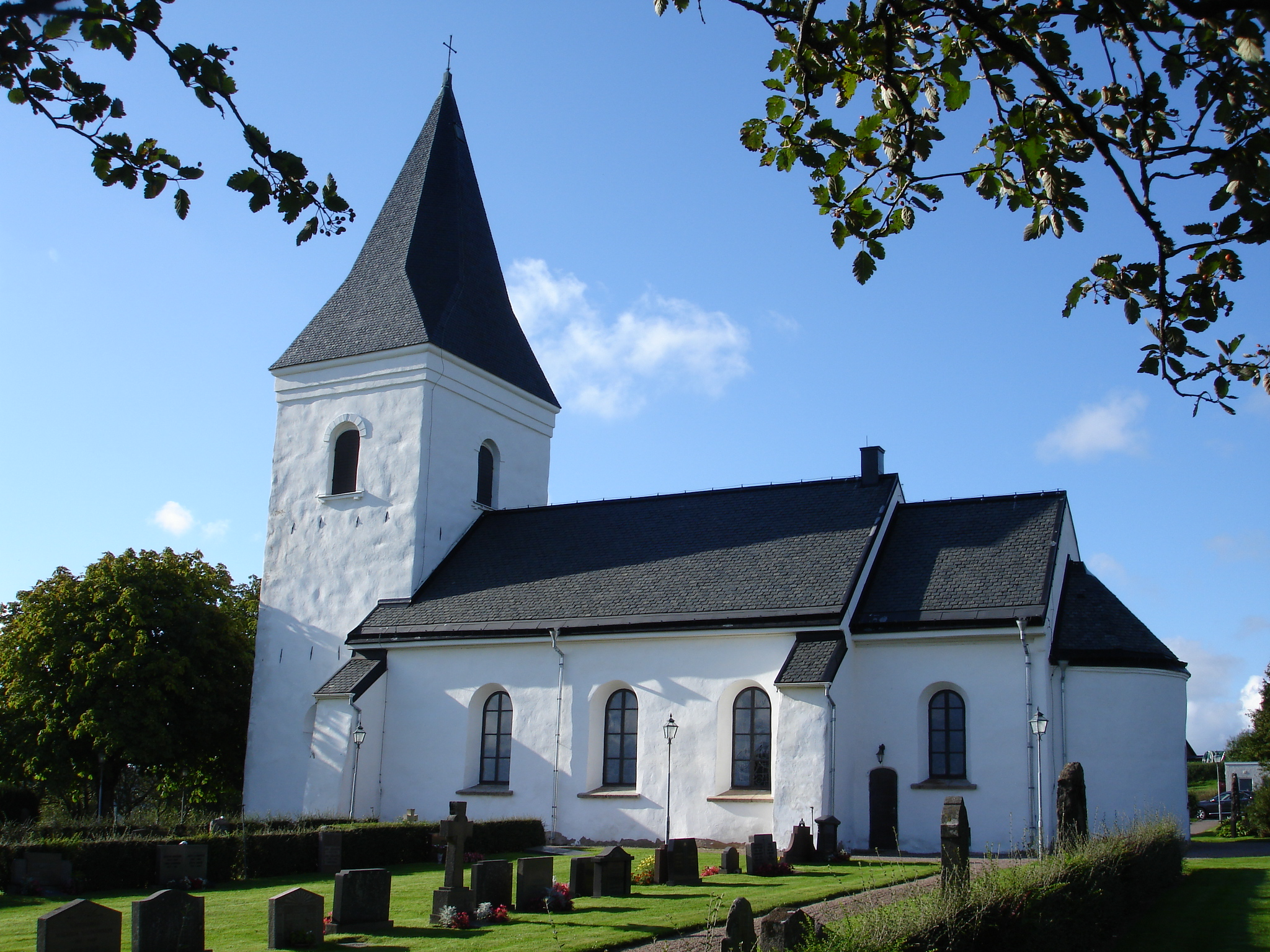 Holms kyrka utanför Halmstad en septemberdag 2011.